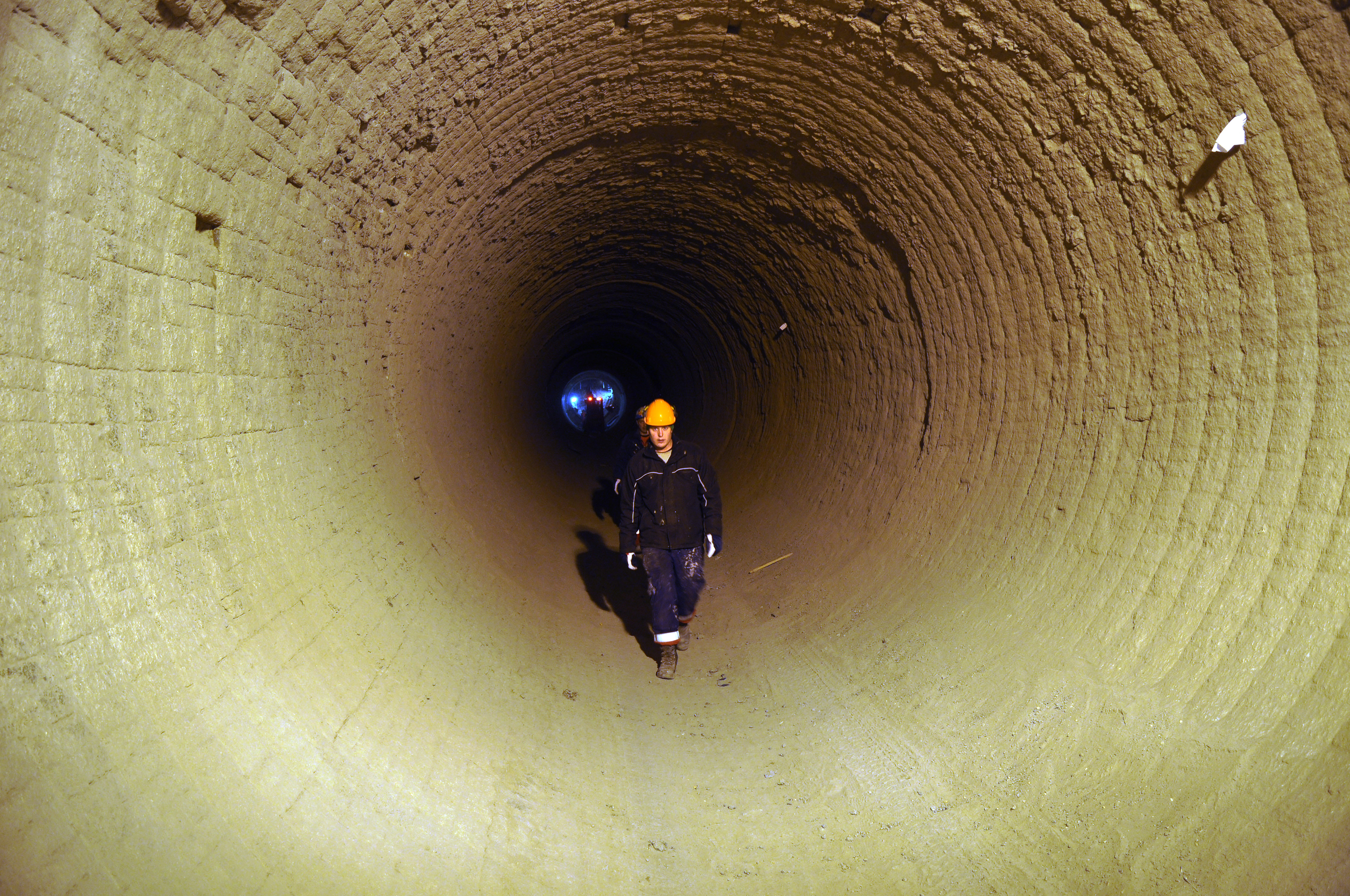 Rotérovnen er et viktig element i ovnssystemet i sementproduksjonen. Denne ovnen består av et langt, roterende stålrør, innsiden er kledt med ildfast stein. Temperaturen på materialene kommer opp i 1450 grader.